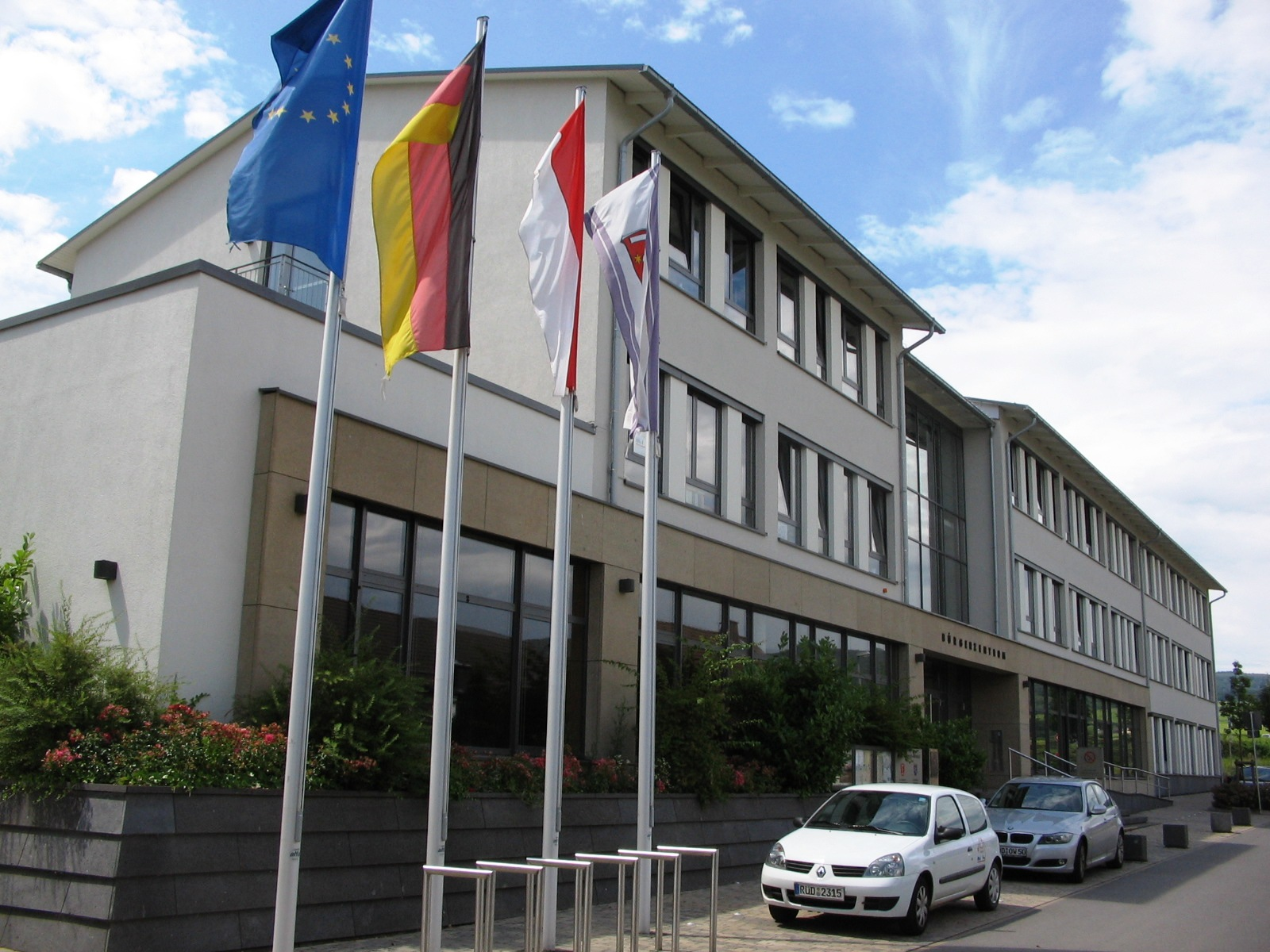 Bürgerzentrum und Rathaus der Stadt Oestrich-Winkel, erbaut im Jahr 2005 im Stadtteil Oestrich, Paul-Gerhardt-Weg 1